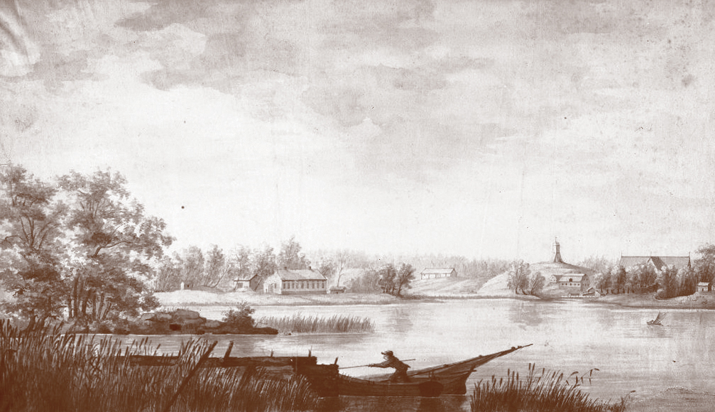 Kyrkan och prästgården samt Prästviken. Lavering i sepia, troligen av Elias Sehlstedt, 1850-talet.